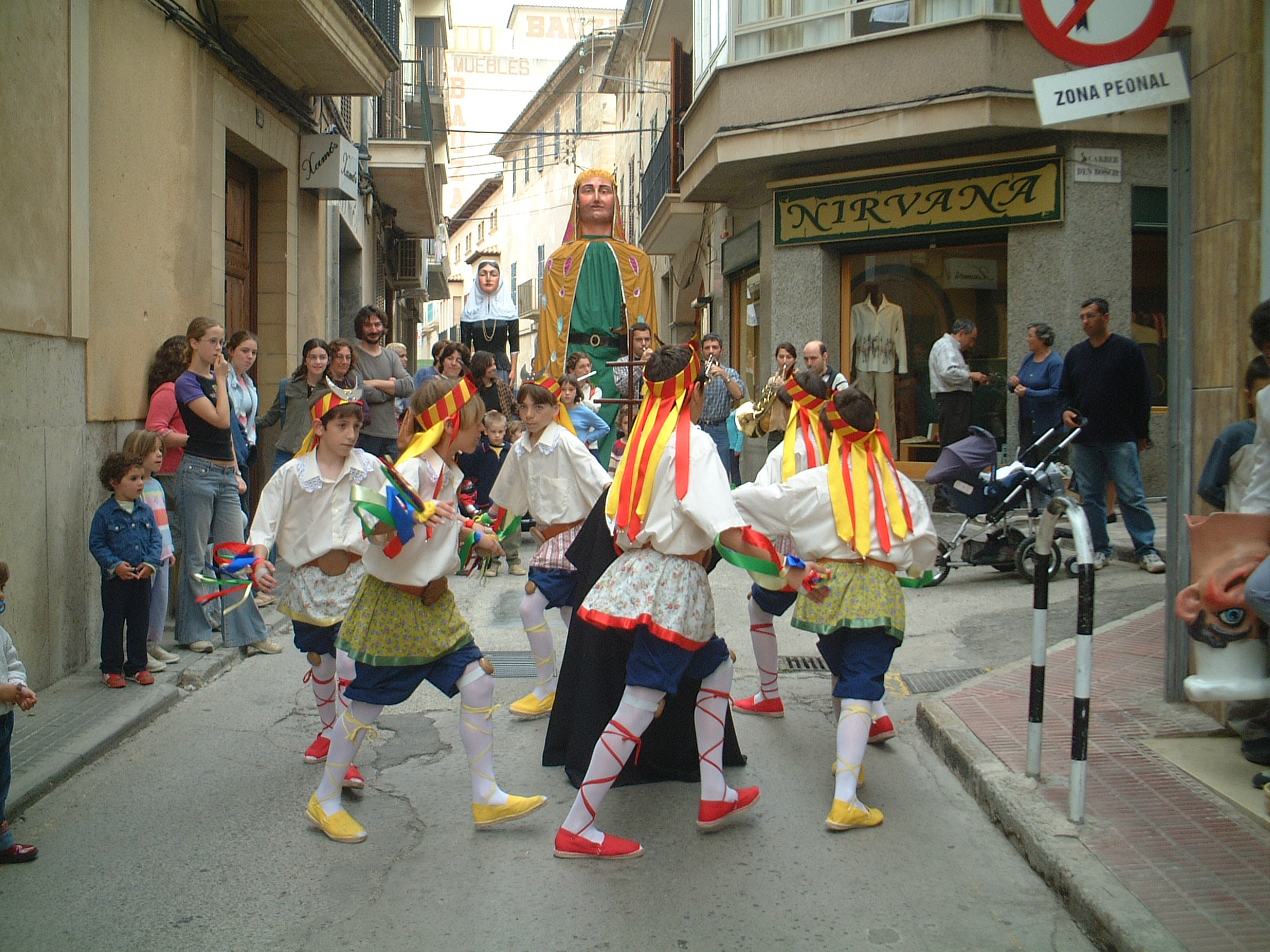 Manacor Autor: Joan Miquel Camera: Fuji